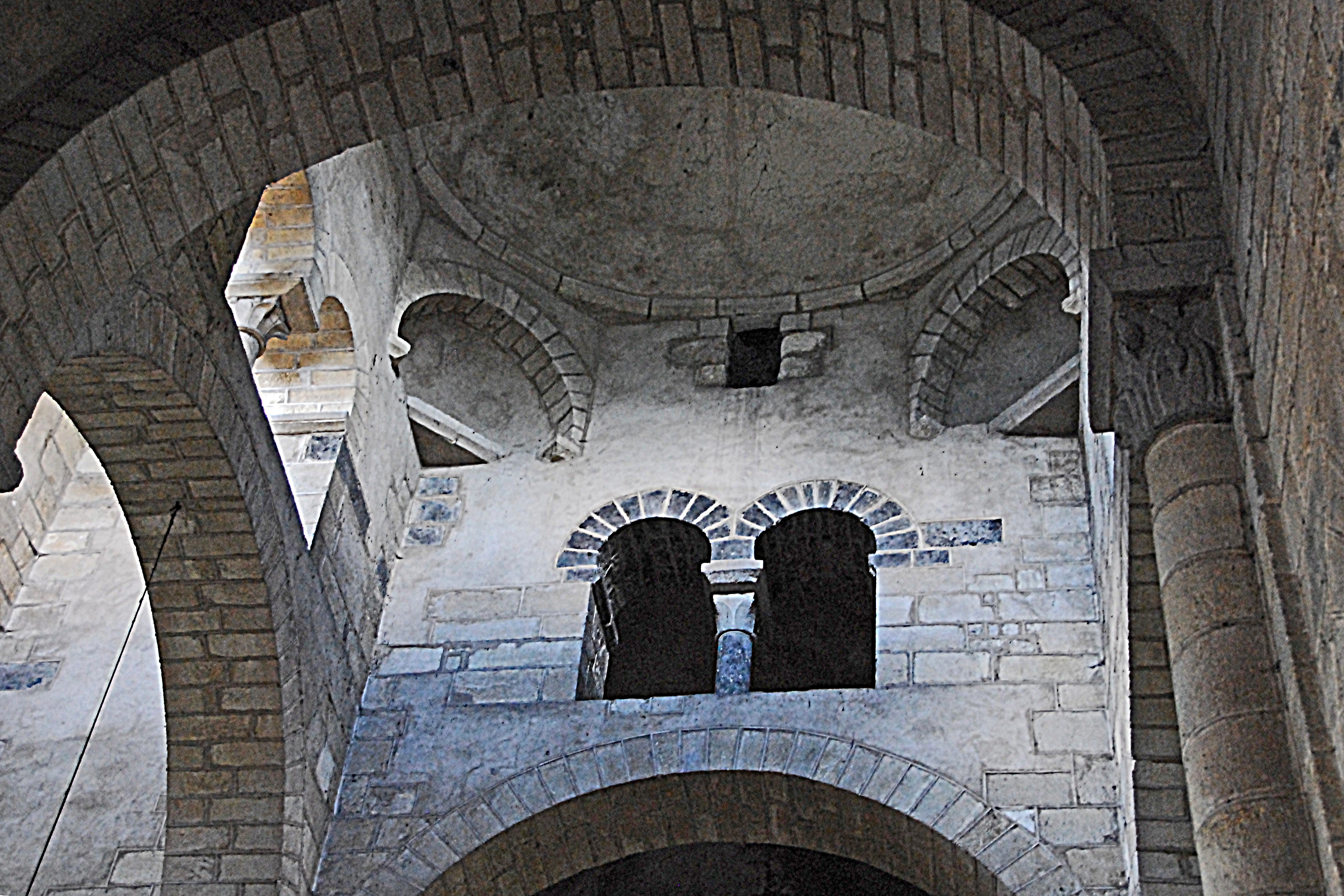 St-Saturnin (Puy-de-Dôme), Vierung m. Trompenkuppel